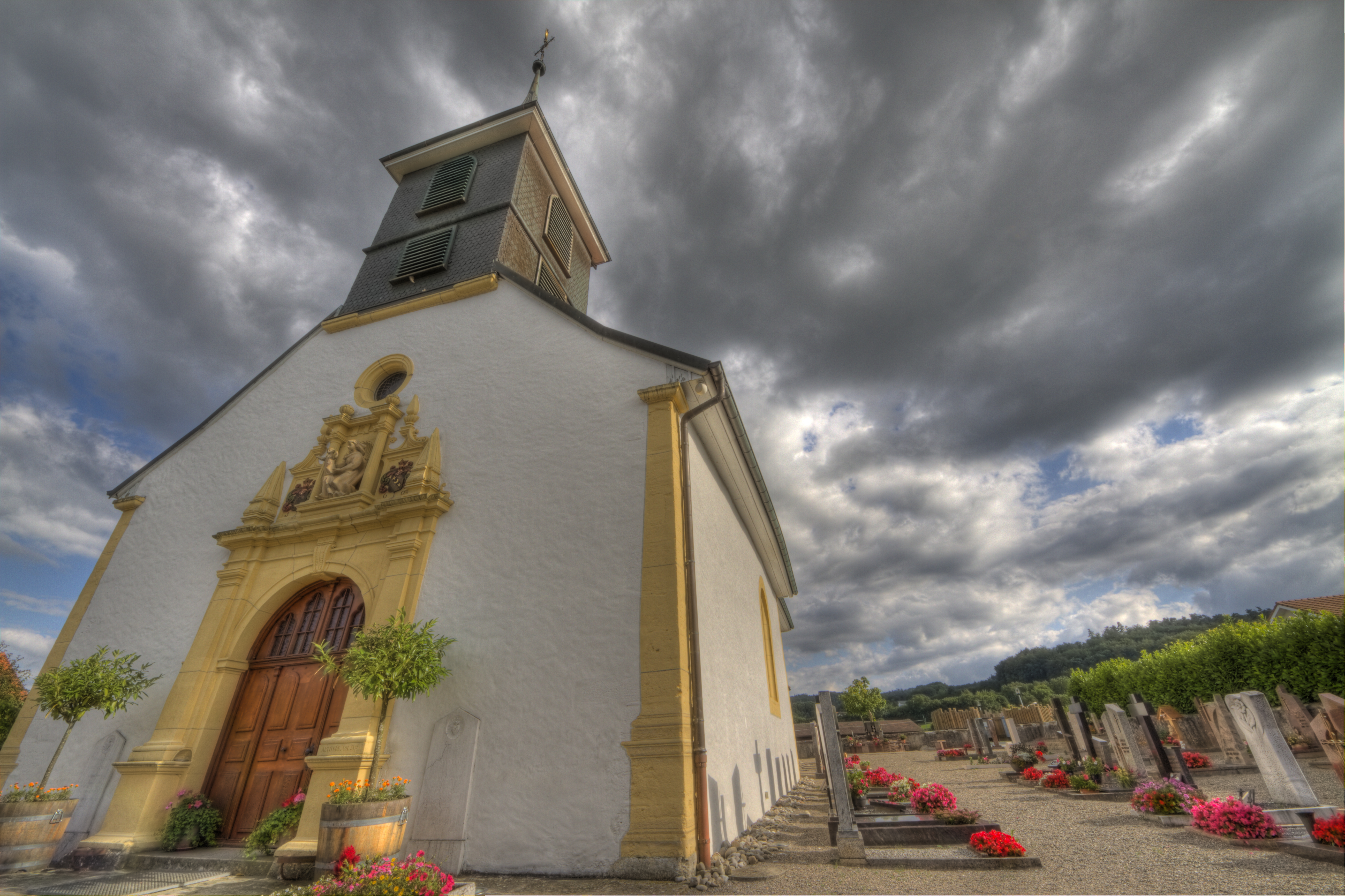 Vue extérieure et cimetière